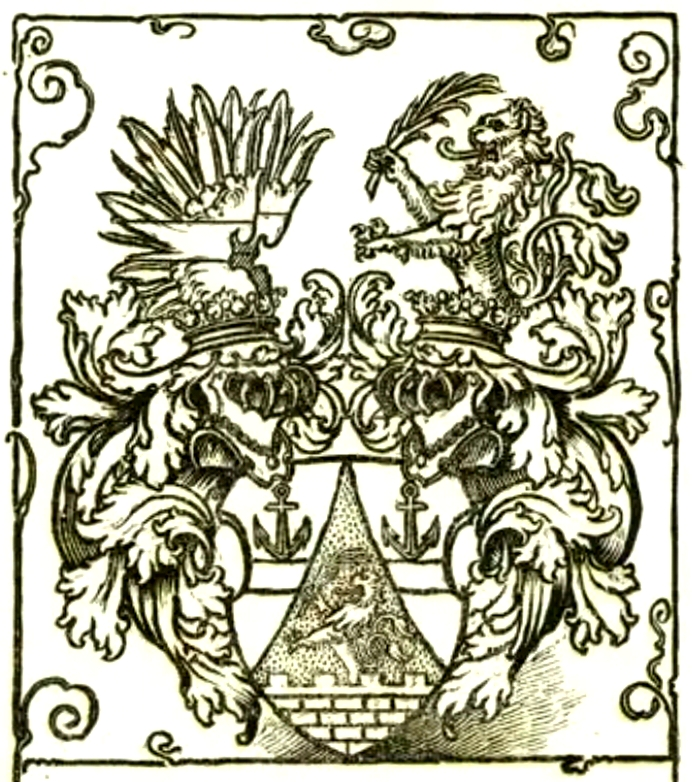 Wappen derer Walcher Ritter von Molthein (Ausschnitt Exlibris für Alfred Walcher Ritter von Molthein (1867–1928))